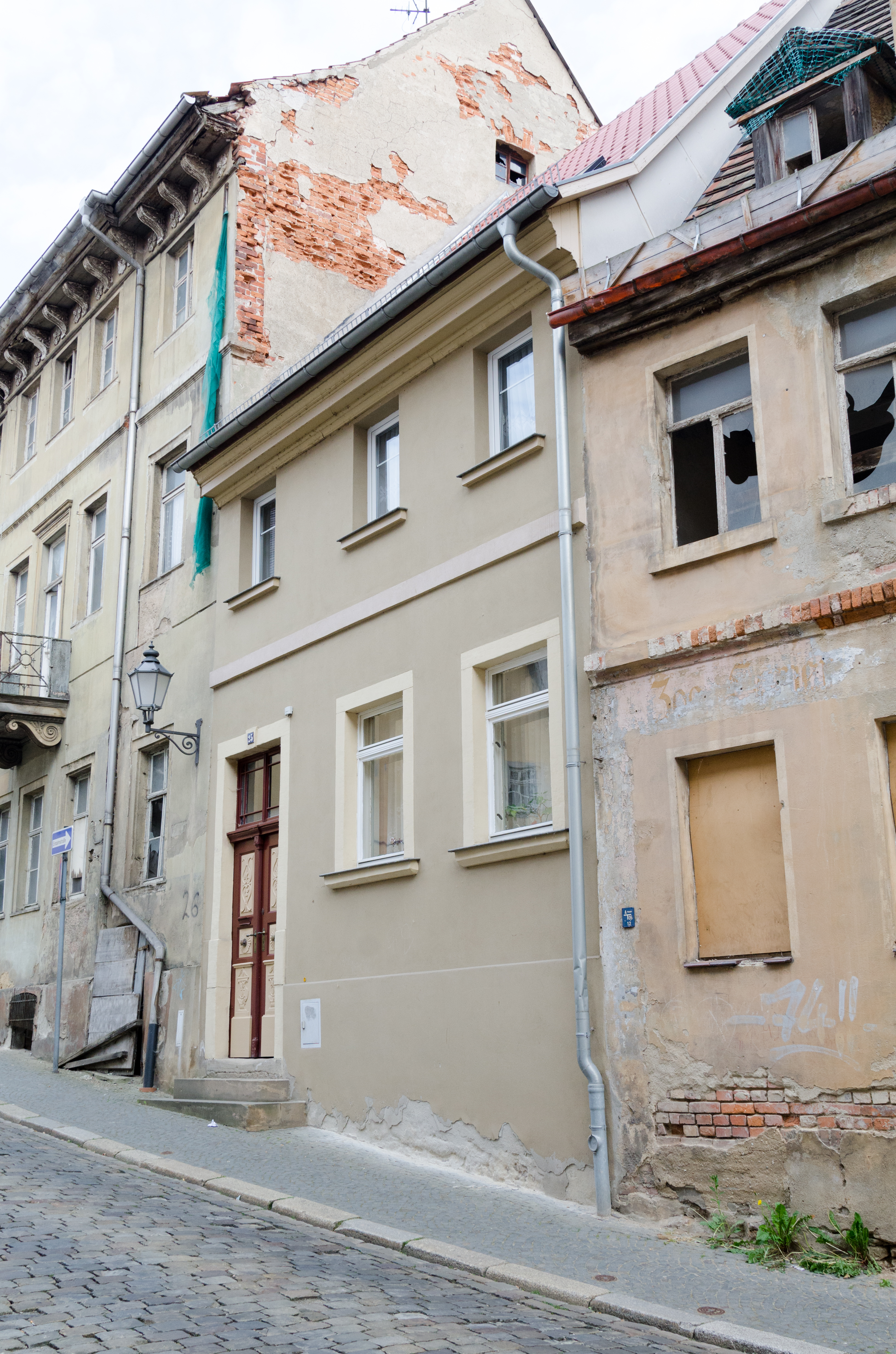 Zeitz, Messerschmiedestraße 25